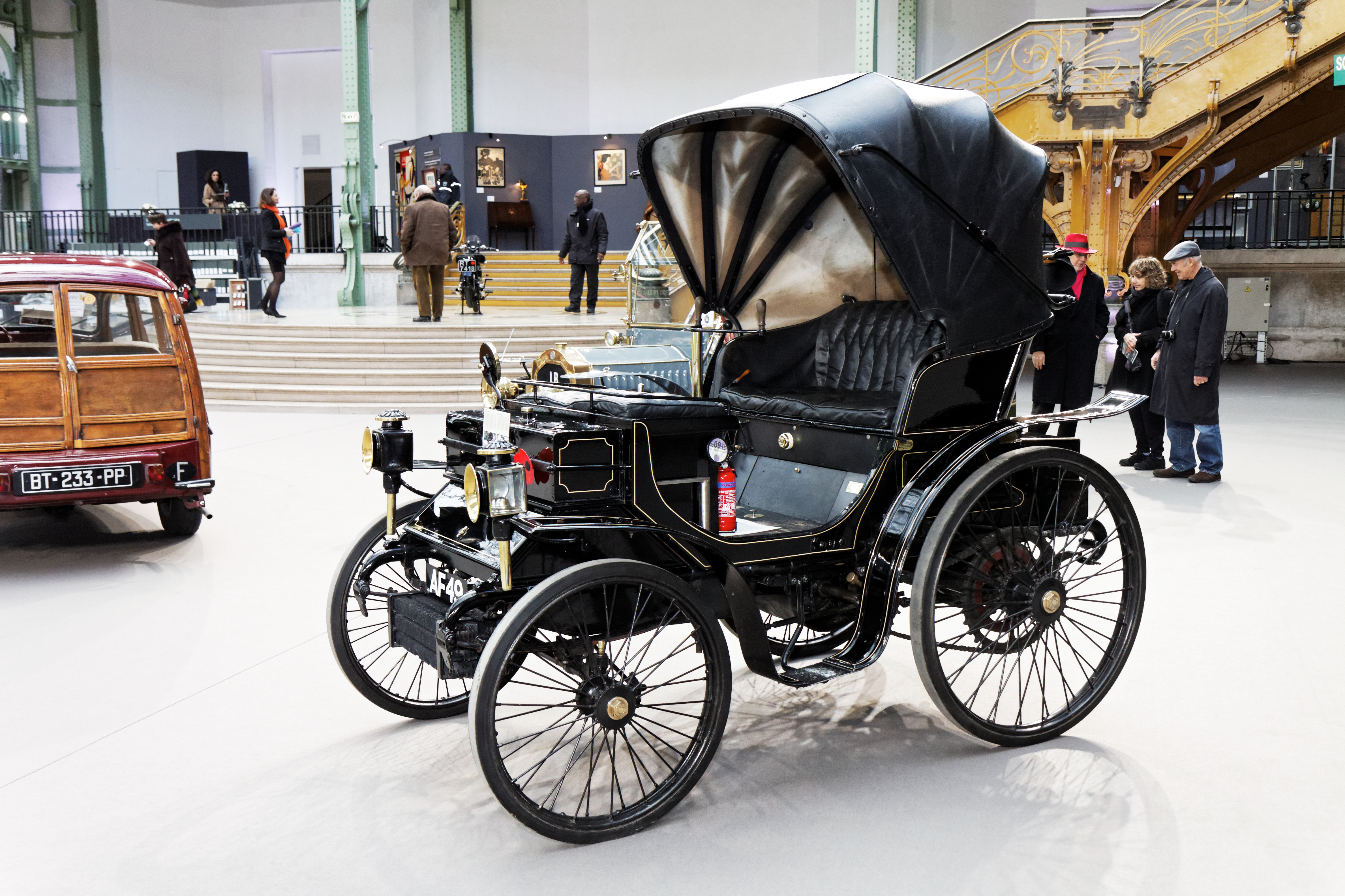 Une Peugeot Type 17 de 1898.